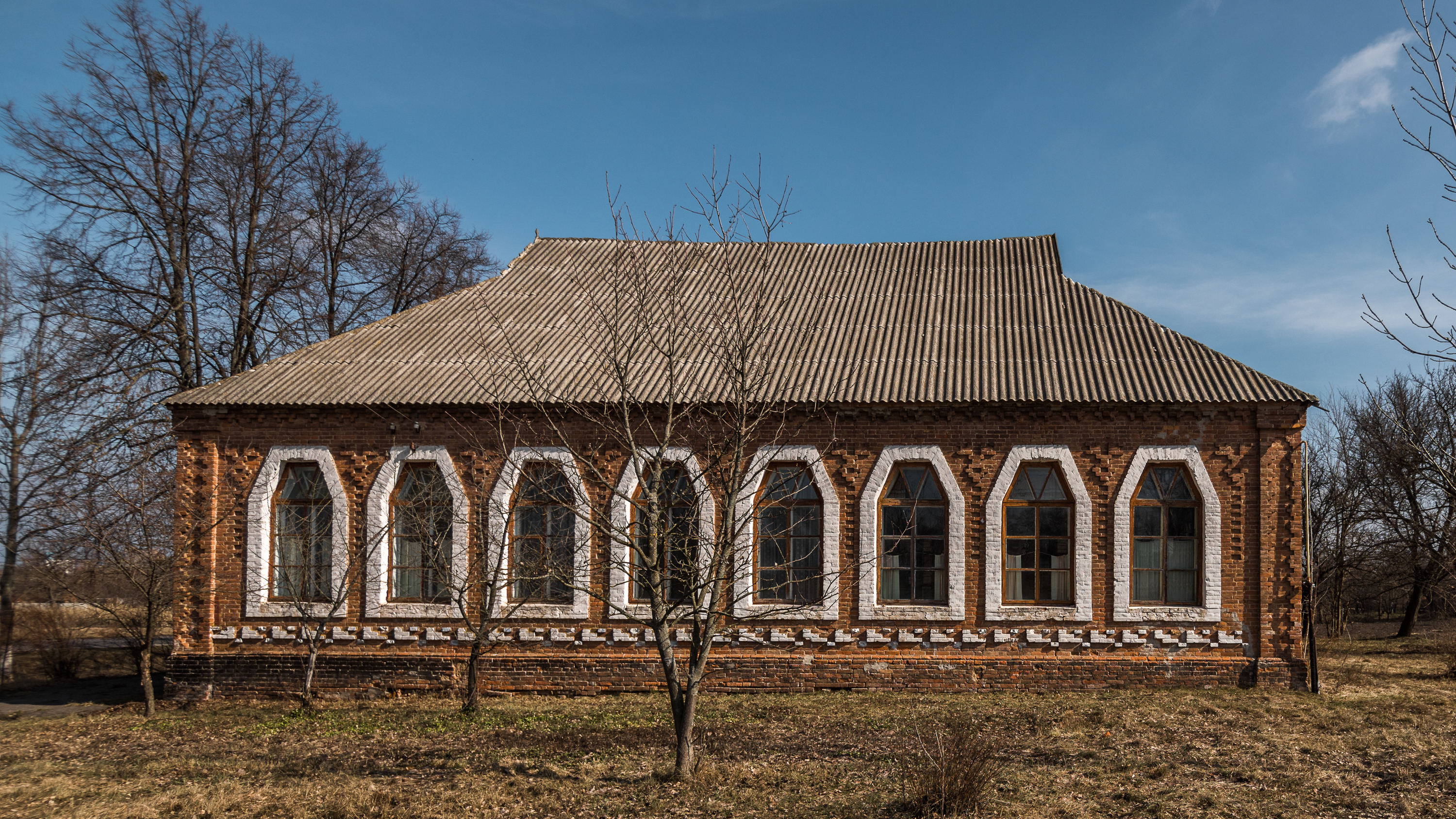 Будинок двокомплектной земської школи в районі Брисі міста Заводського Лохвицького району Полтавської областіі. Архітектор О. Сластьон.